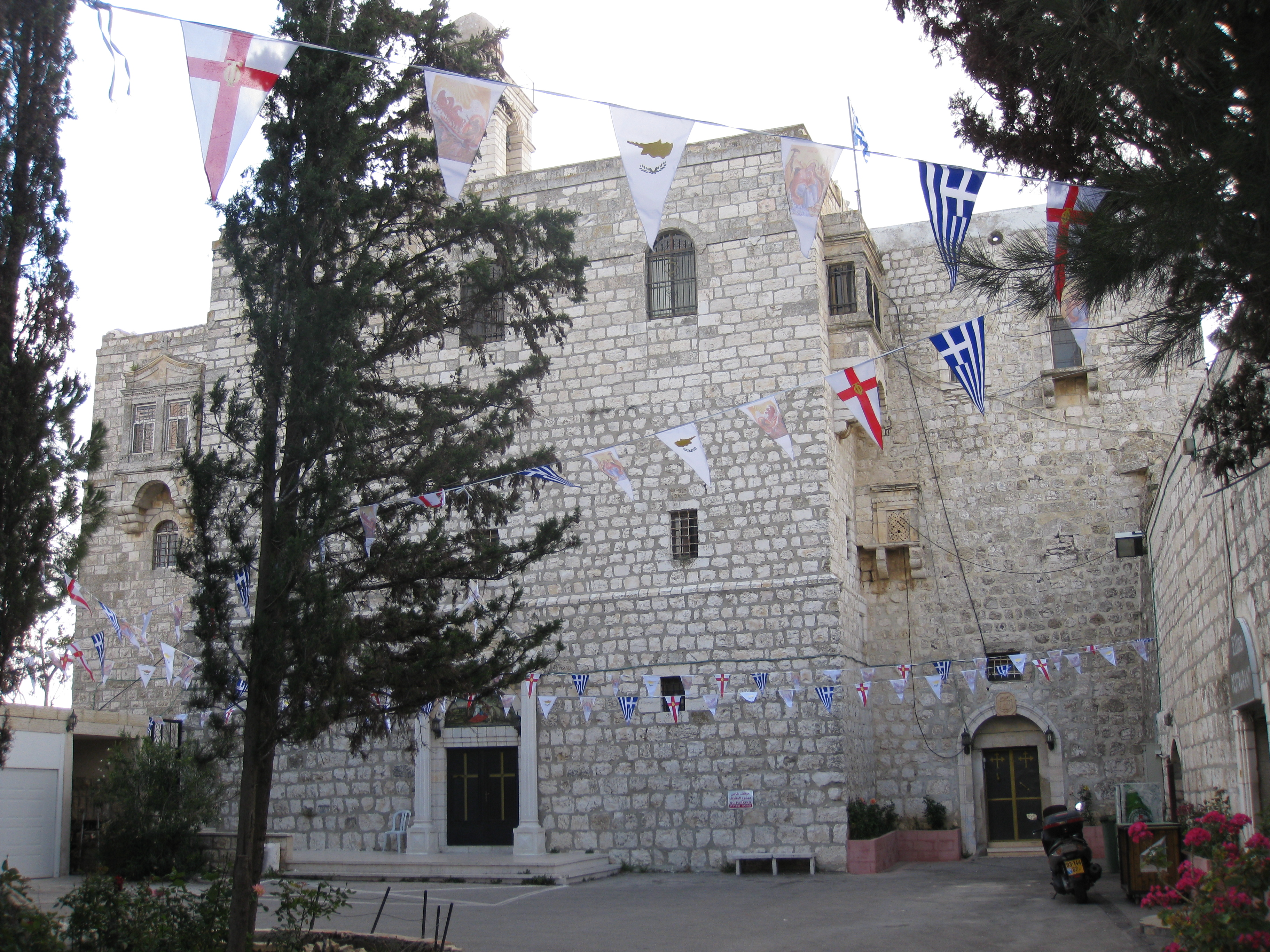 Mar Elias Monastery, Jerusalem מנזר מר אליאס דרך חברון, ירושלים